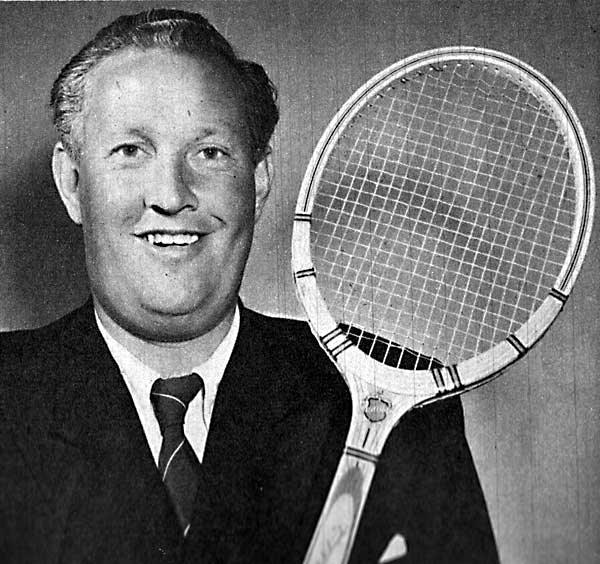 Kalle Schröder